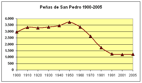 Peñas de San Pedro's population, Albacete, Spain, (1900-2005). Own work, given to PD. Source: Instituto Nacional de Estadística.